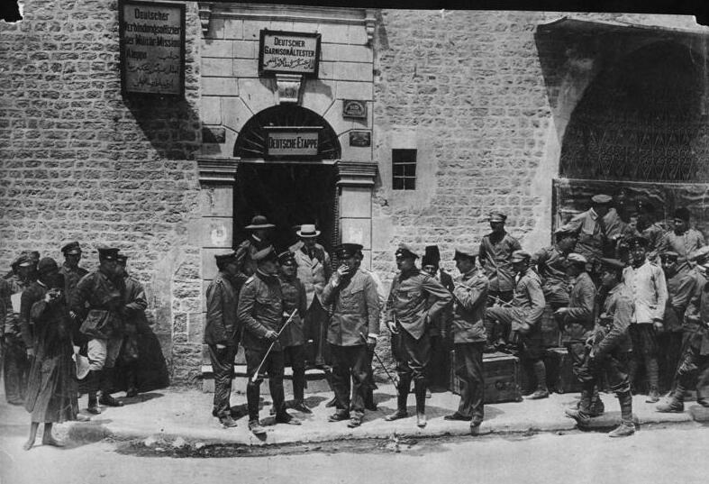 Deutsche Truppen im Orient Leben und Treiben vor der "Deutsche Etappe" in Aleppo Syrien, Sommer 1917